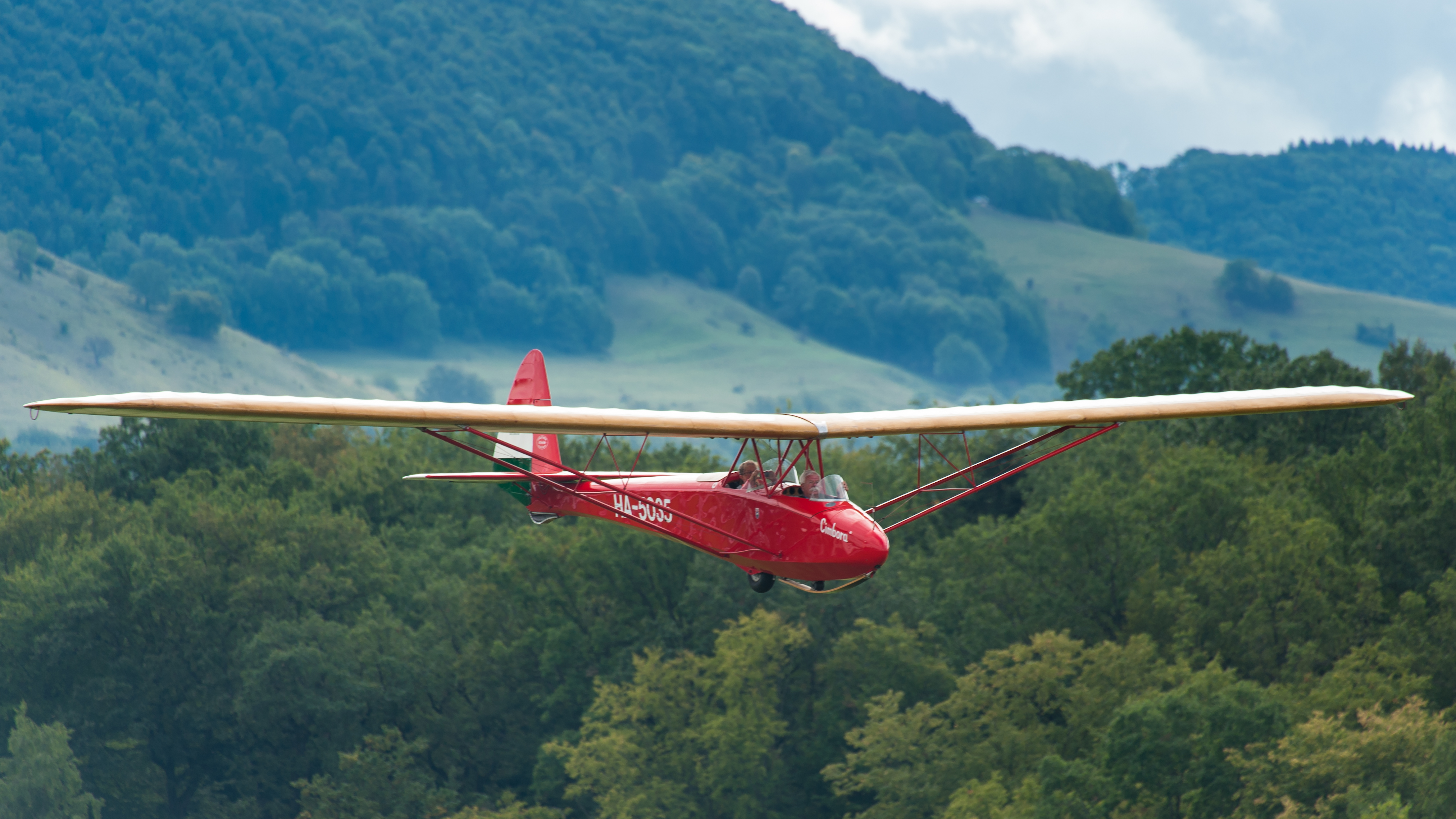 Dieses Foto wurde beim Oldtimer Fliegertreffen, 2013 am Flugfeld Hahnweide bei Kirchheim unter Teck aufgenommen. Es zeigt das Segelflugzeug, Rubik R-11b Cimbora im Landeanflug